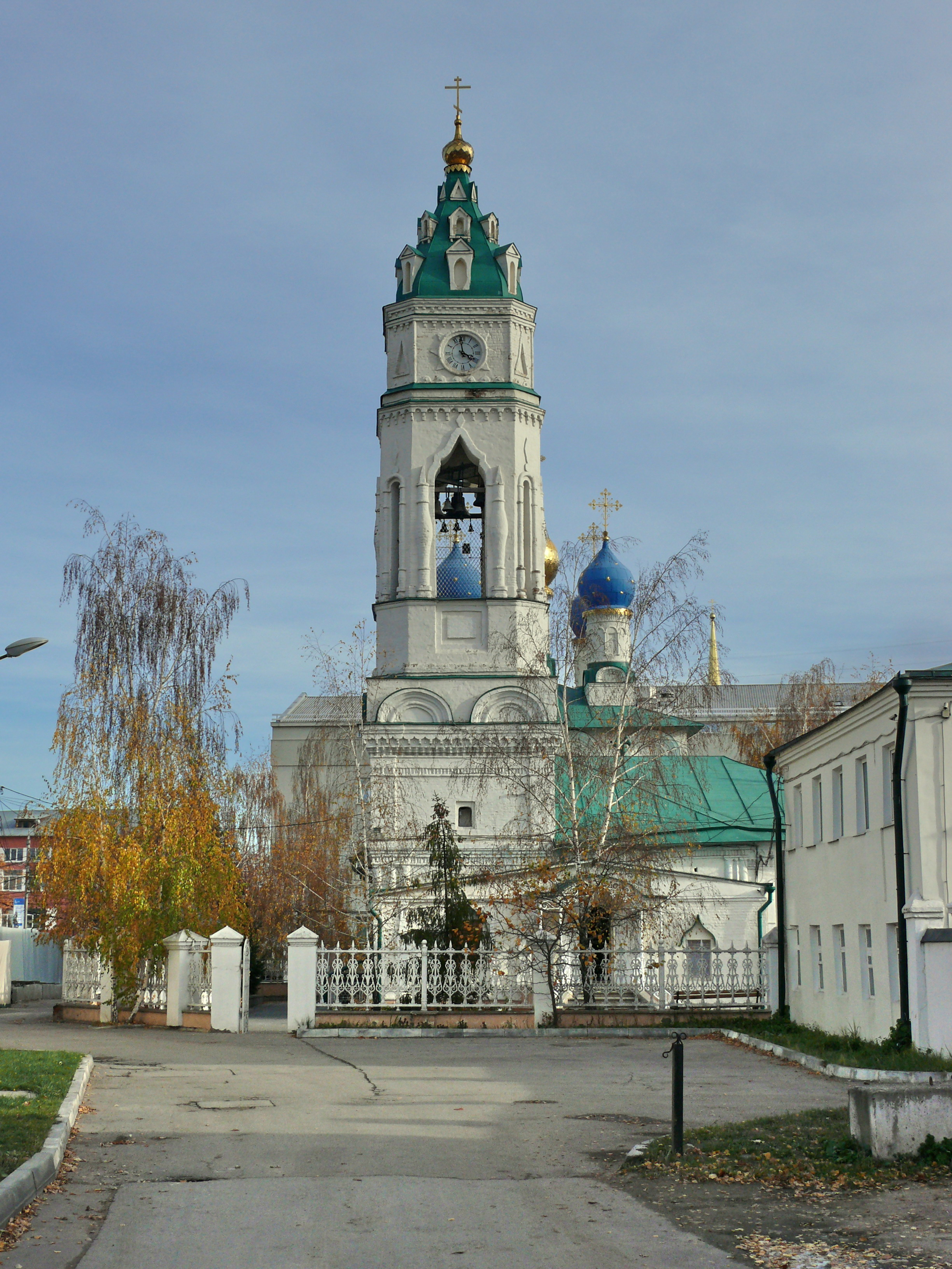 Церковь Благовещенская (Тульская область, Тула, Советский переулок, 1)